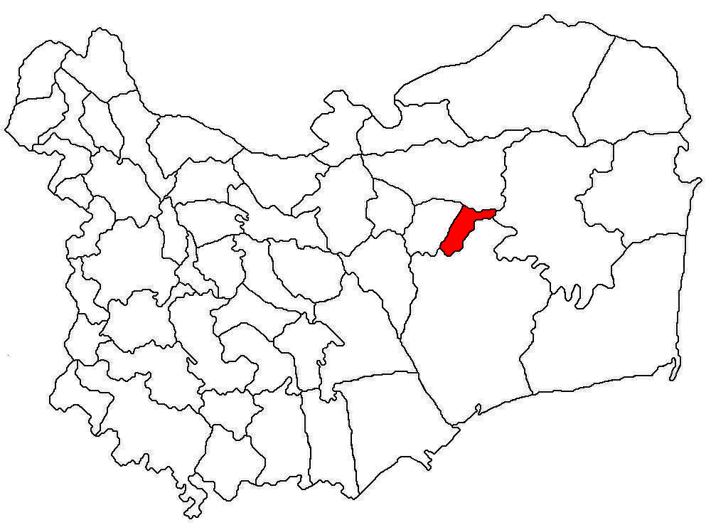 Categorie:Hărţi ale judeţului Tulcea